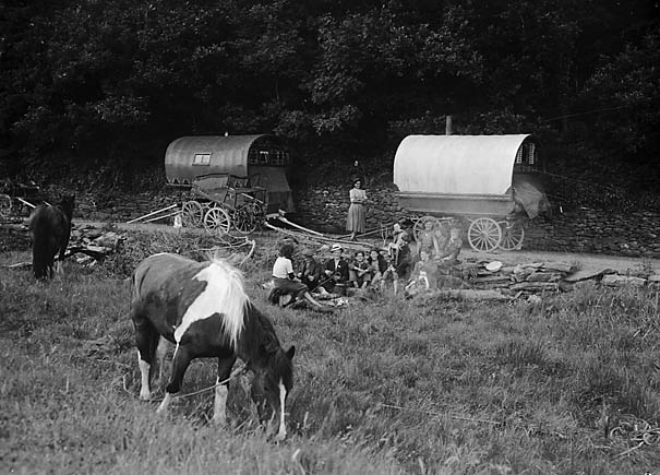 Teitl Cymraeg/Welsh title: Sipsiwn yn gwersylla - mwy na thebyg yn Abertawe. Ffotograffydd/Photographer: Geoff Charles (1909-2002) Dyddiad/Date: 01/06/1953 Cyfrwng/Medium: Negydd ffilm / Film negative Cyfeiriad/Reference: (gch04573) Rhif cofnod / Record no.: 3369135 Rhagor o wybodaeth am gasgliad Geoff Charles yn Llyfrgell Genedlaethol Cymru More information about the Geoff Charles Collection at the National Library of Wales Mae ffotograffau Geoff Charles hefyd yn rhan o Broject Europeana Libraries Geoff Charles' photographs also form part of the Europeana Libraries Project